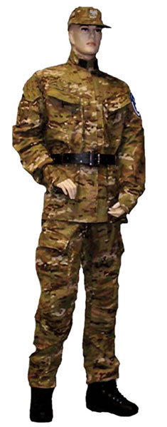 Umundurowanie ćwiczebne ABW